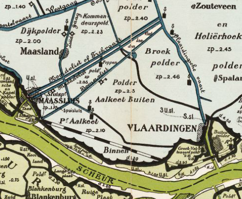 aalkeet polders